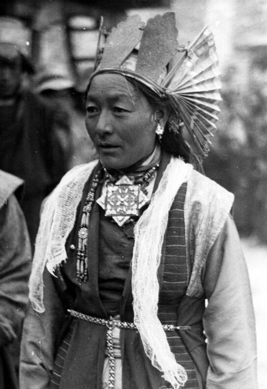 Lhasa, Neujahr, tibetischer Tänzer